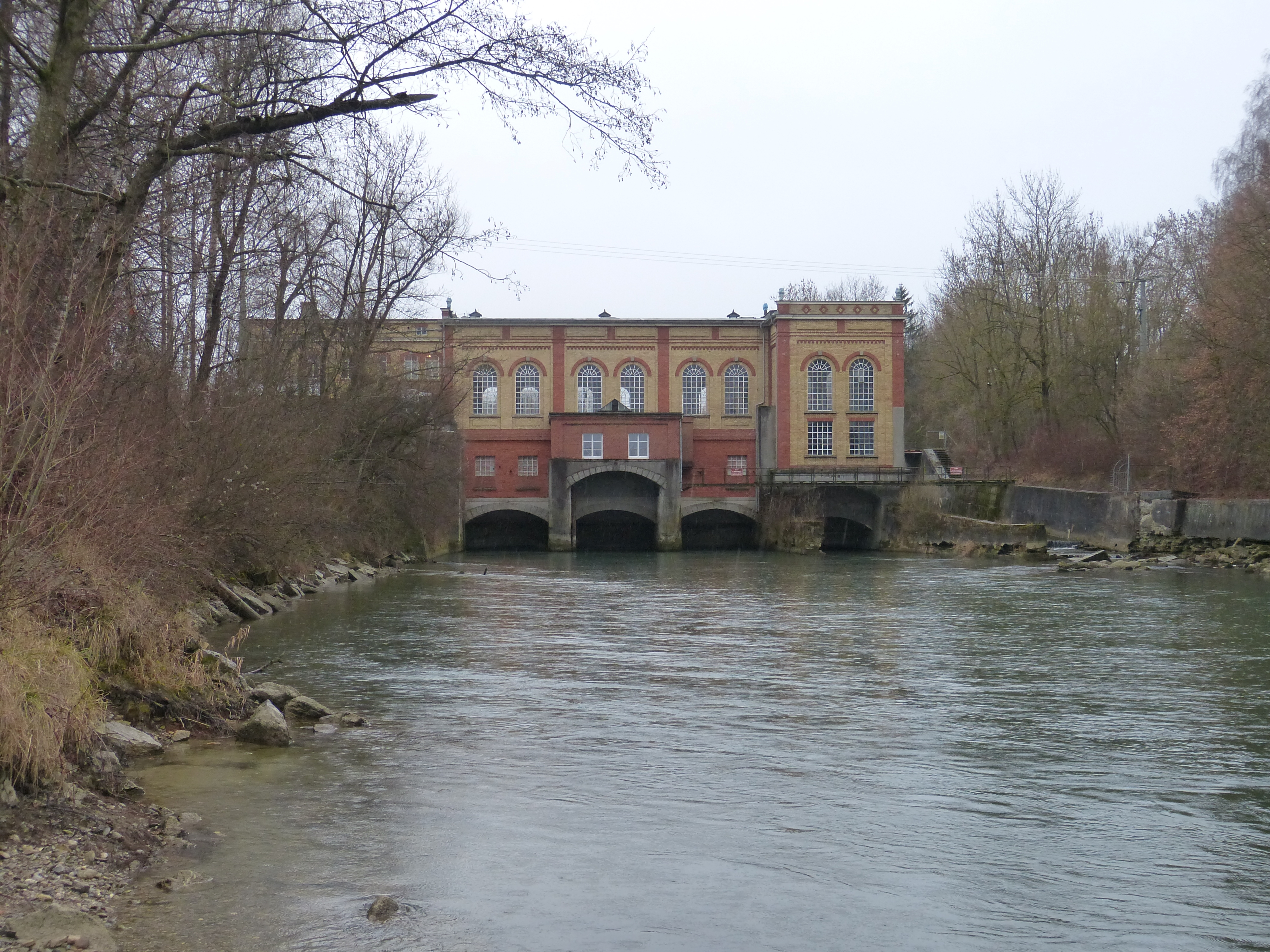 Das Wasserkraftwerk Wolfzahnau in Augsburg, vom Triebwerkskanal, d.h. von der unteren/hinteren Seite (Norden) gesehen.